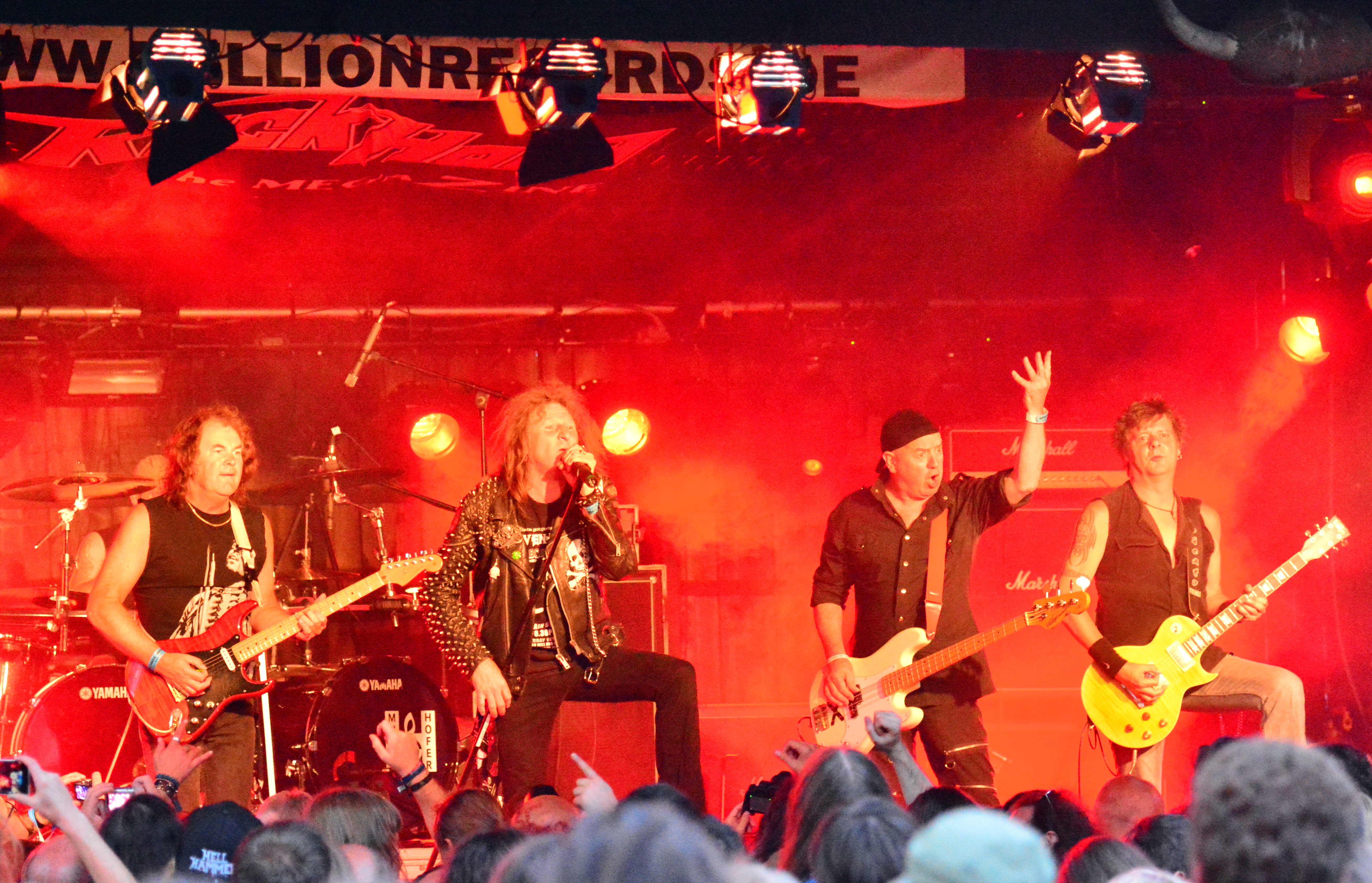 Oliver/Dawson Saxon beim Headbangers Open Air 2014